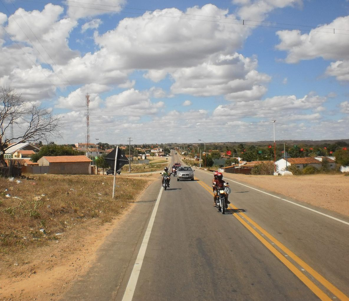 BR-405 em São Francisco do Oeste, Rio Grande do Norte, Brasil.